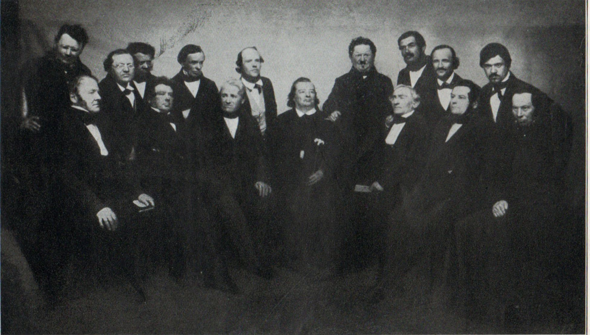 Mitglieder der Gräßles-Gesellschaft. Hintere Reihe (stehend) von links nach rechts: Adolf Schliz, August Strauß, David Gräßle, Adolf von Goppelt, Julius Rieckher, Philipp Sicherer, Albert Barth, Gottlob Höring, Coloman Pfaff. Untere Reihe (sitzend) von links nach rechts: Heinrich Titot, Heinrich Feyerabend, Freiherr Carl von Gemmingen, Justinus Kerner, Carl Künzel, Ferdinand Bürger, Eberhard Finck